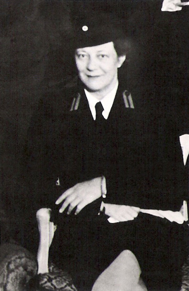 Marina Paulíny, Filadelfia, 1944